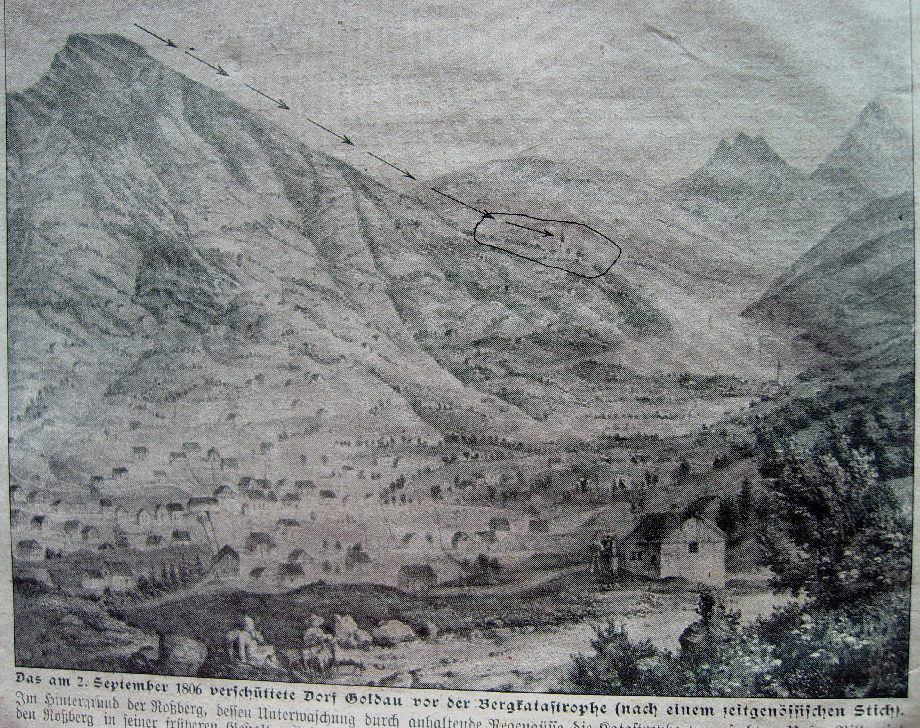 Zeitgenössischer Stich von Goldau vor der Bergkatastrophe